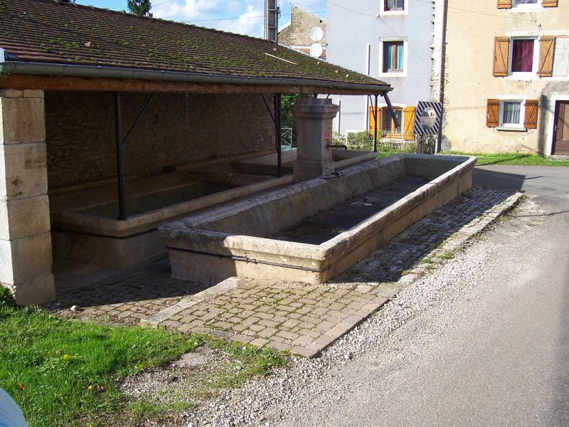 fontaine de la petite commune française d'Onans située dans le département du Doubs